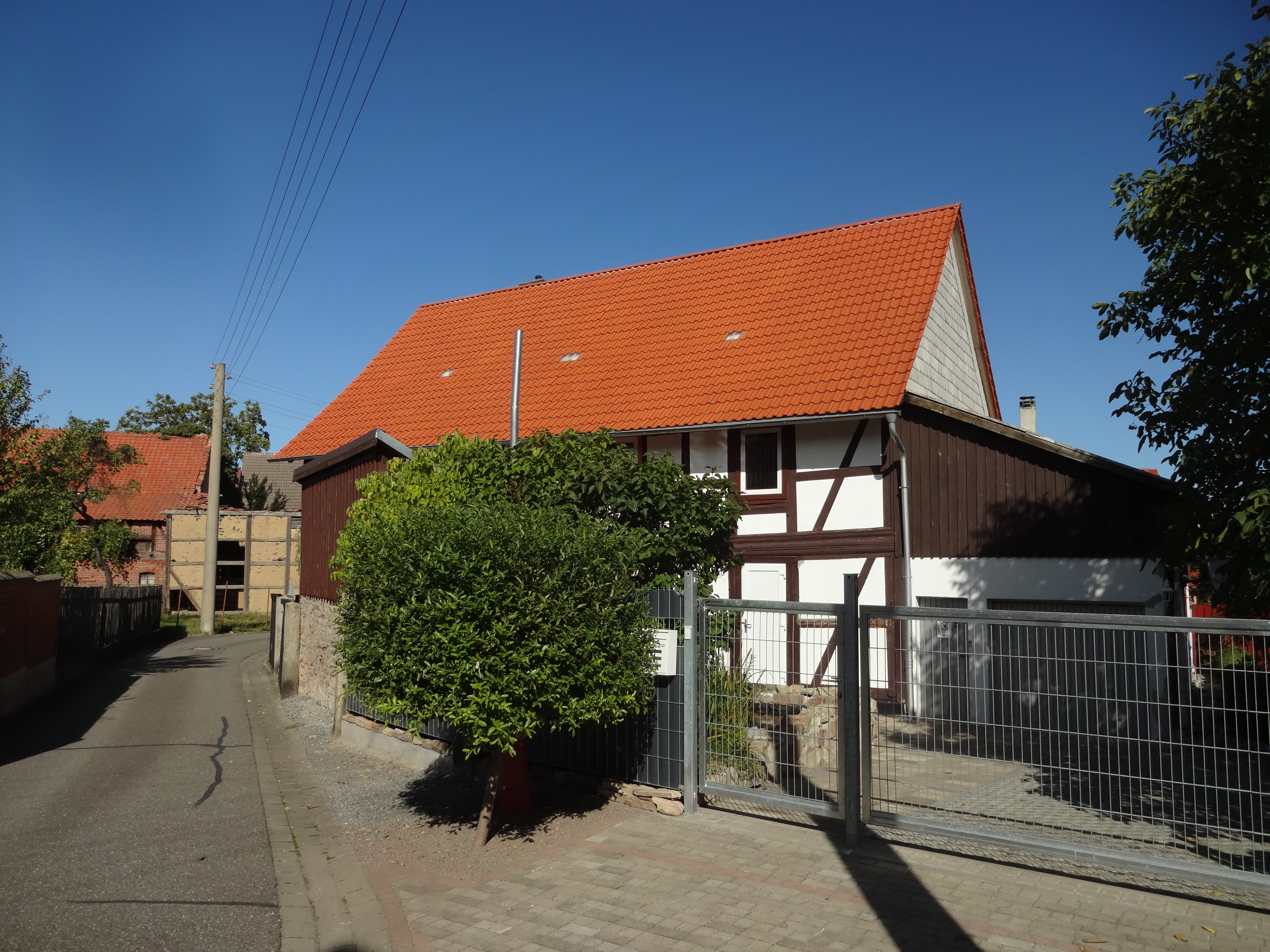 denkmalgeschütztes Bauernhaus in der Backhausgasse 5 in Drübeck